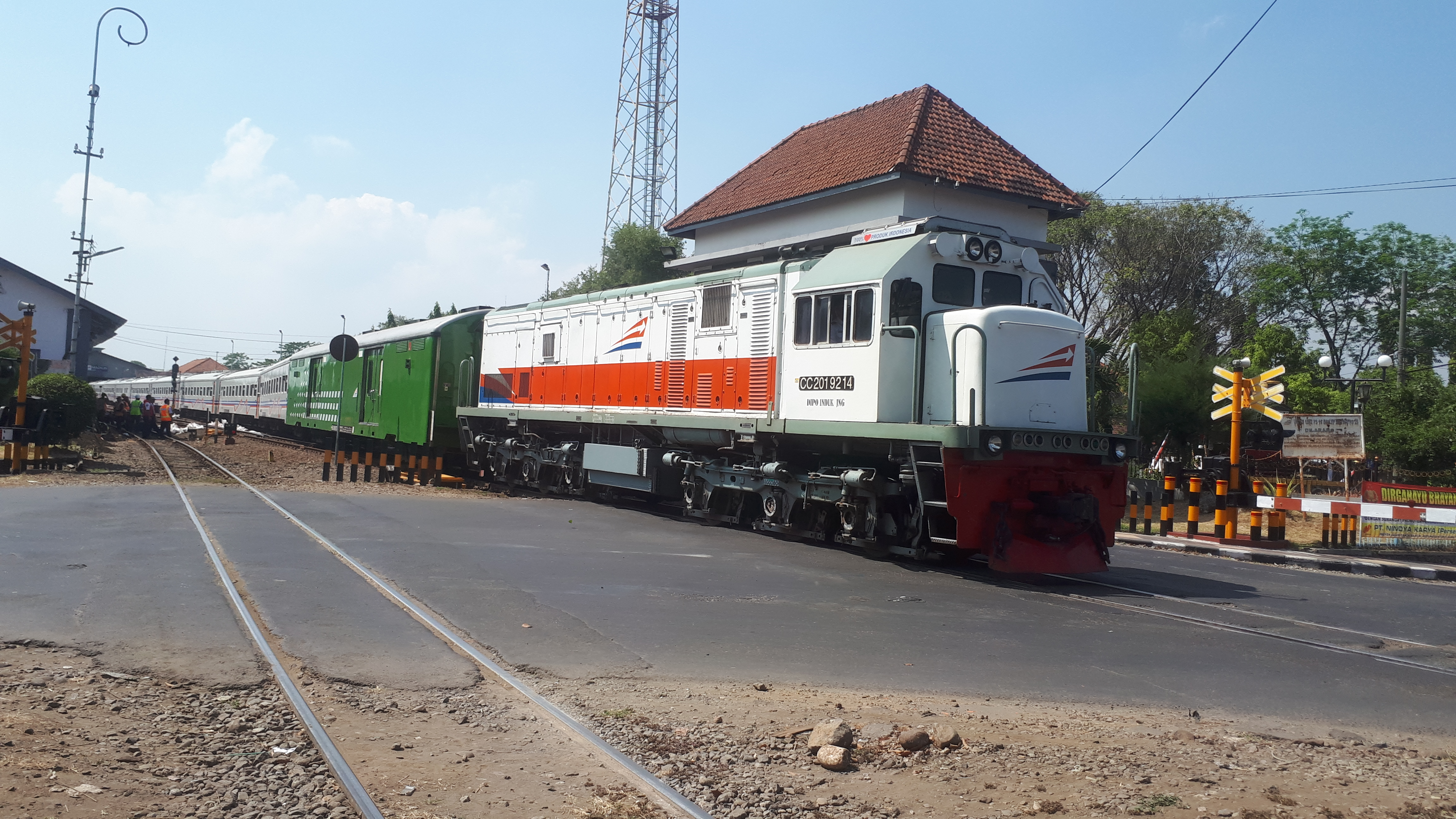 Kereta api Singasari saat meninggalkan Stasiun Madiun